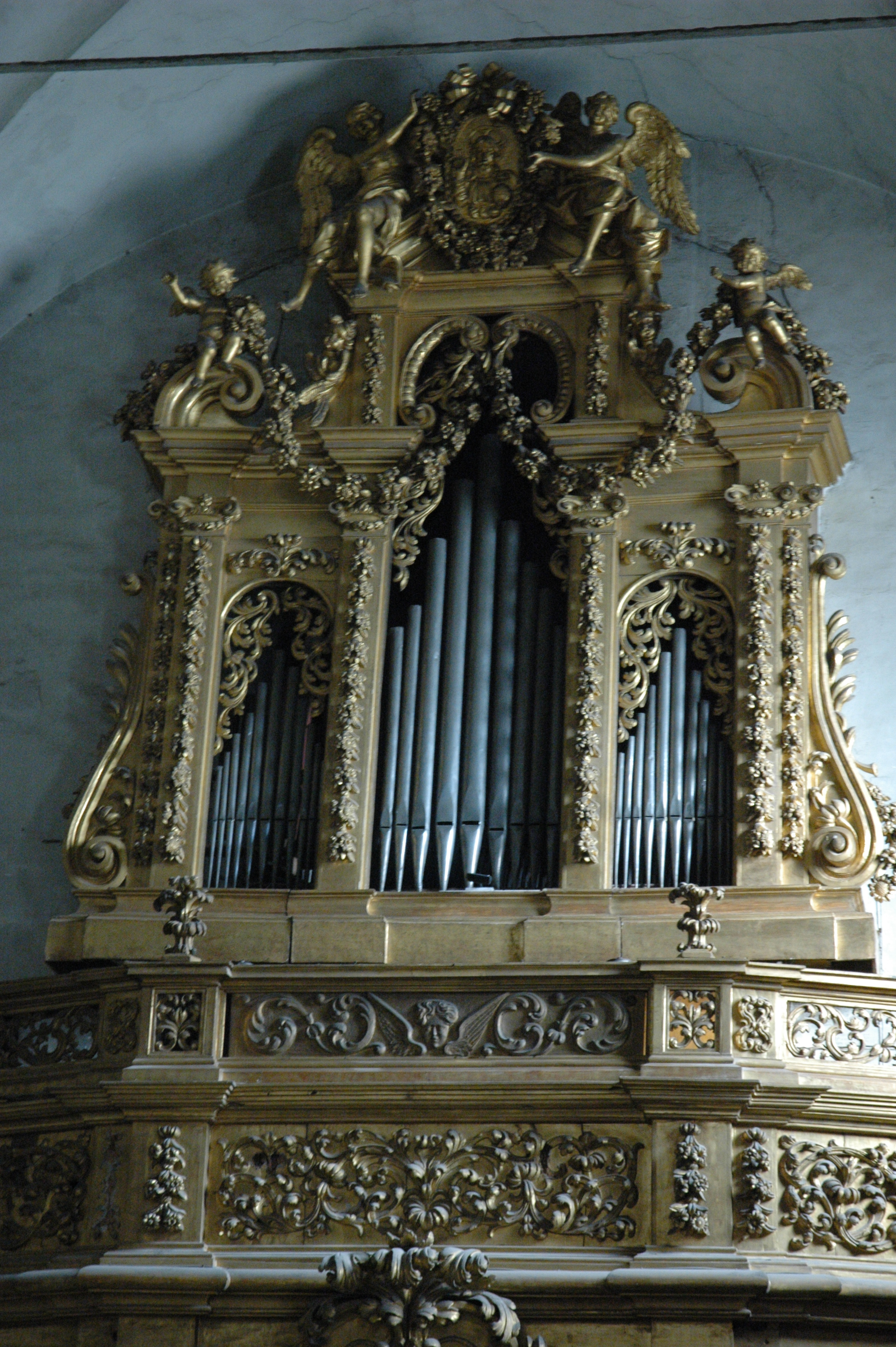 羅馬聖彼得枷鎖教堂1